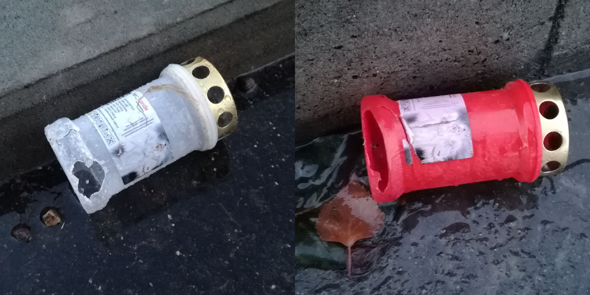 Need kalmuküünlad on Hallvaresed toonud Tartust Pauluse kalmistult. Hallvaresed on need lähedalasuvas Raudtee tänavas asfaldile puruks kukutanud ja seejärel tühjaks nokkinud.